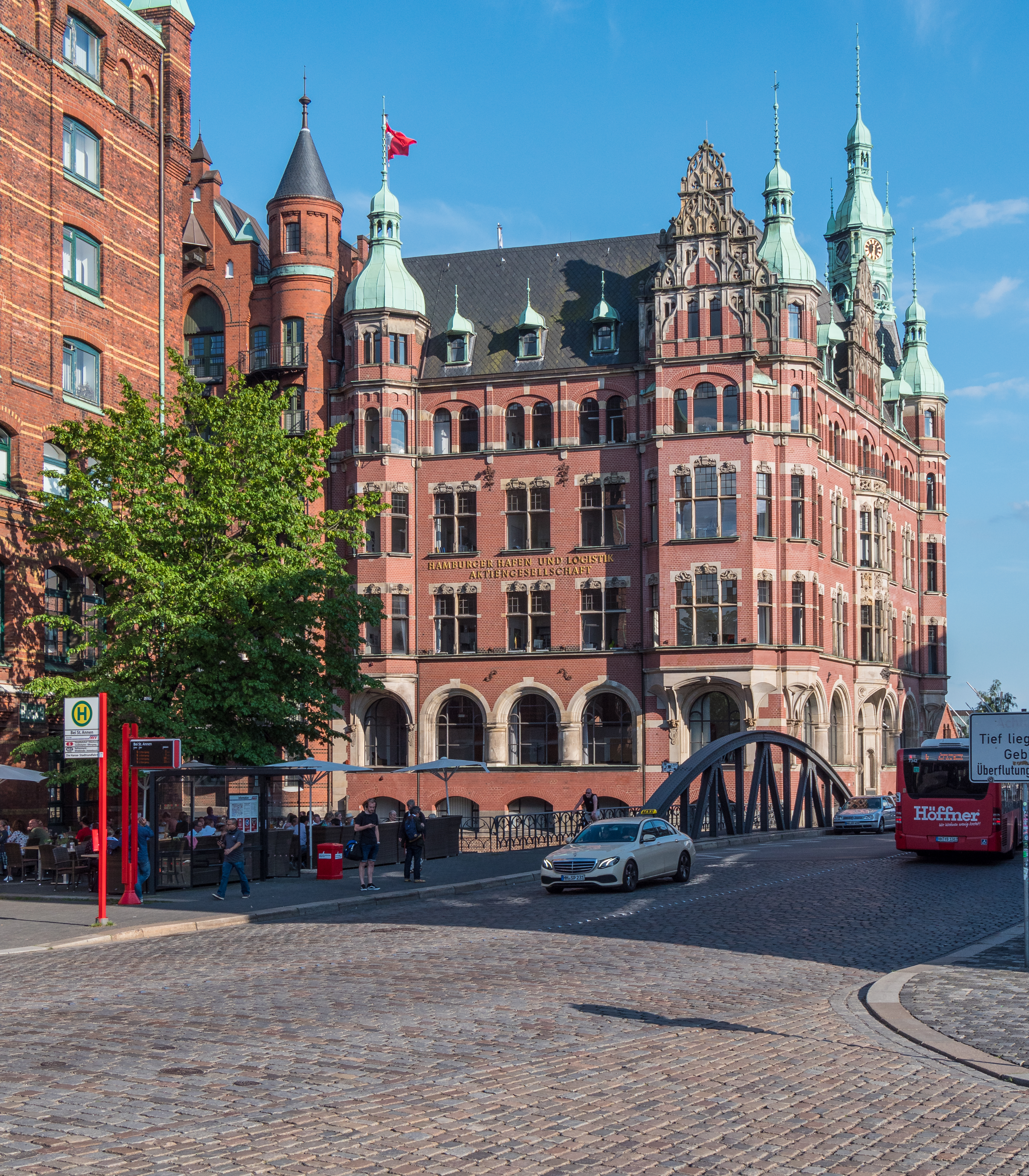 Hamburg: Speicherstadtrathaus, erbaut 1902 - 1904 und Verwaltungssitz der Hamburger Hafen und Logistik AG (HHLA).